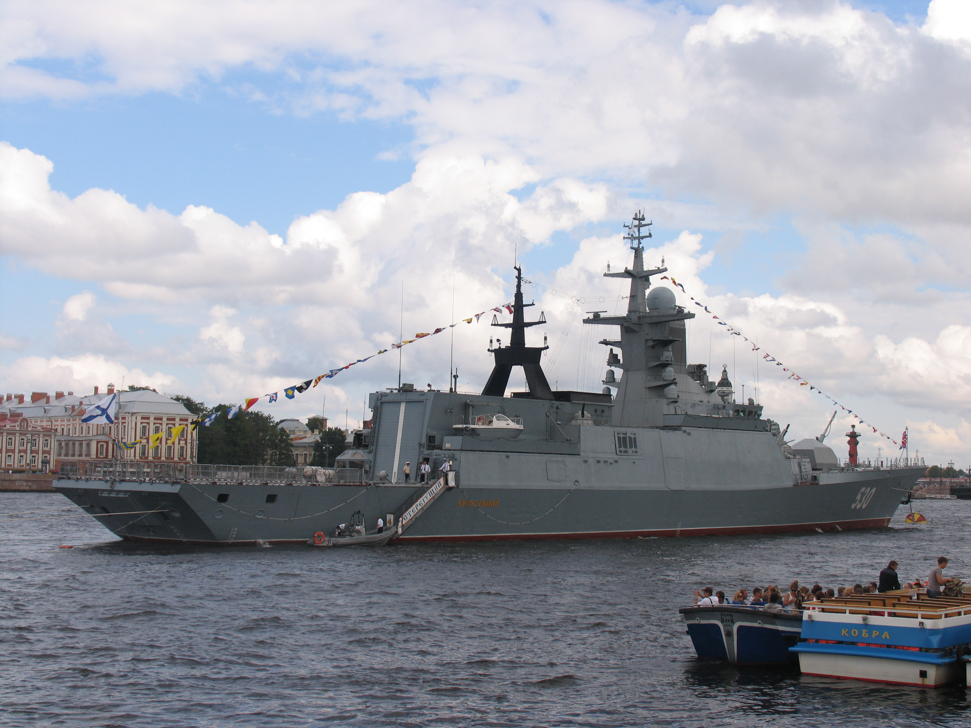 "Стерегущий" на Дне ВМФ в Санкт-Петербурге, 2011 год. Вид сзади.